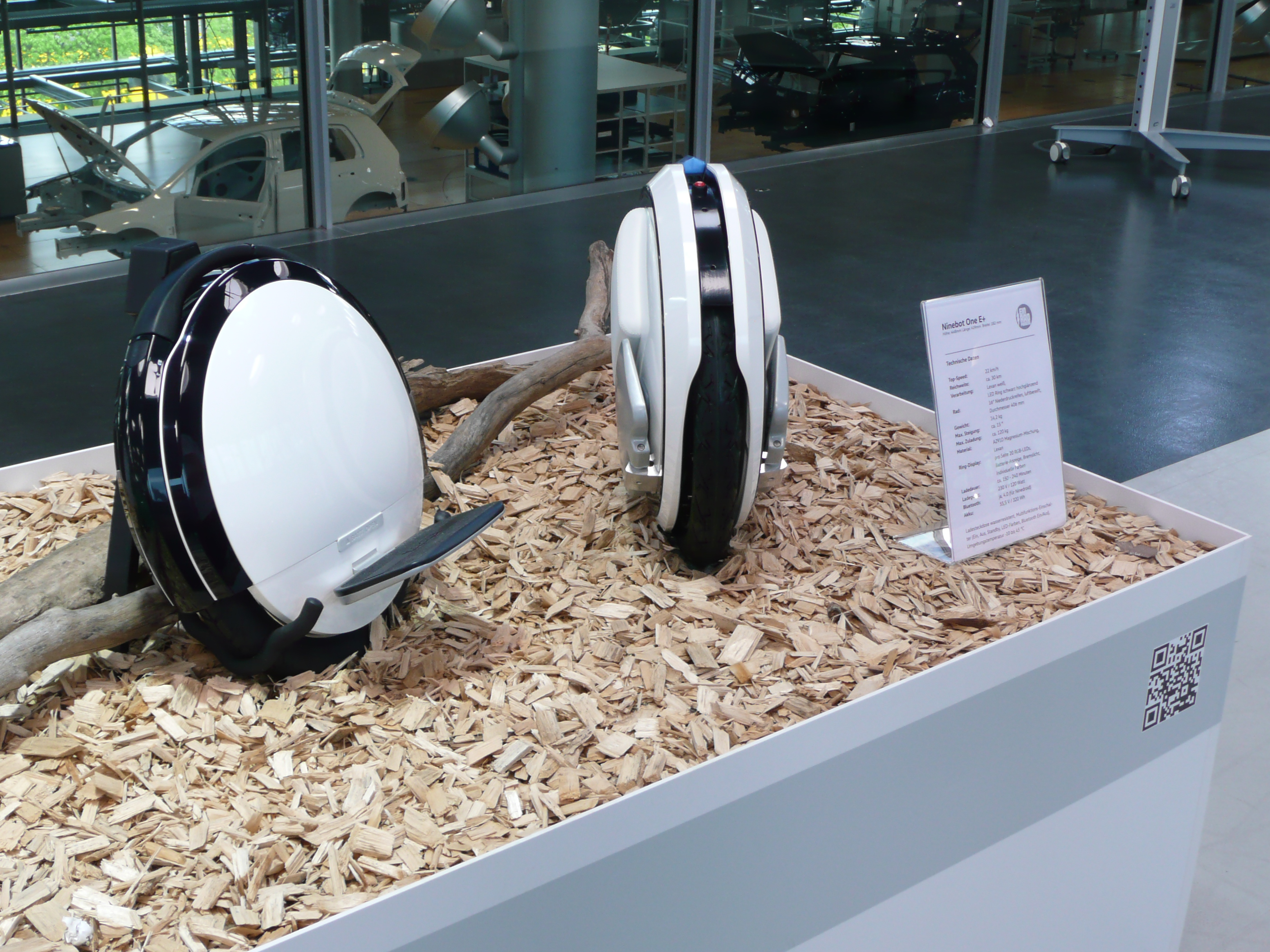 Einrad, präsentiert zur Ausstellung der Elektromobilität in der Gläsernen Manufaktur